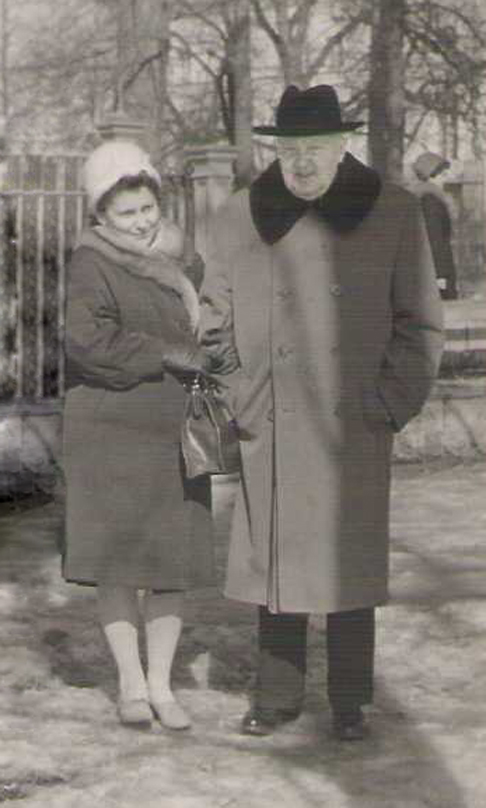 Л. М. Предтеченская с А. В. Предтеченским в парке г. Пушкин, 1962 год.